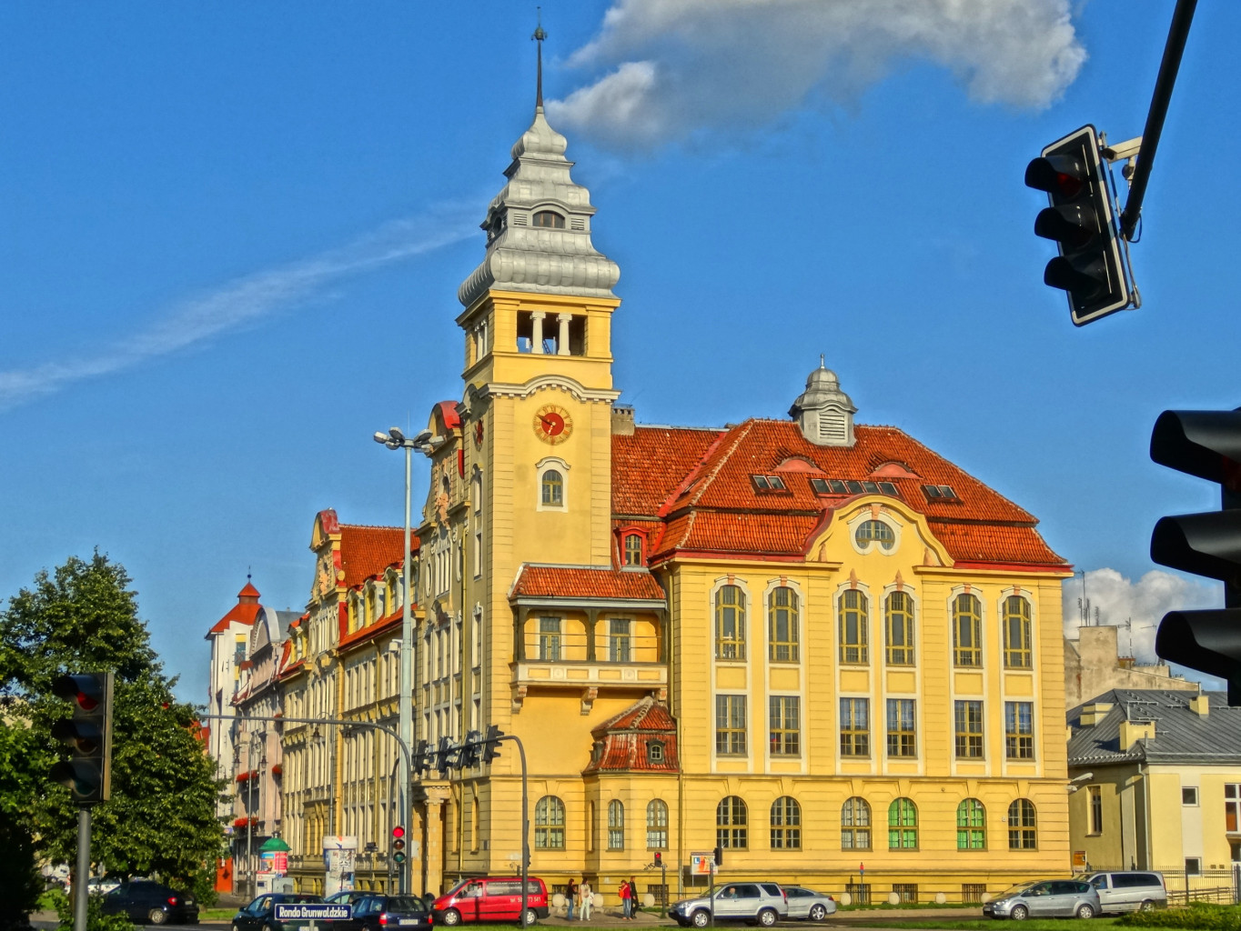 Dawna Szkoła Rzemiosła i Przemysłu Artystycznego, zbud. 1910-1911, obecnie Zespół Szkół Mechanicznych, Bydgoszcz ul. Świętej Trójcy 37